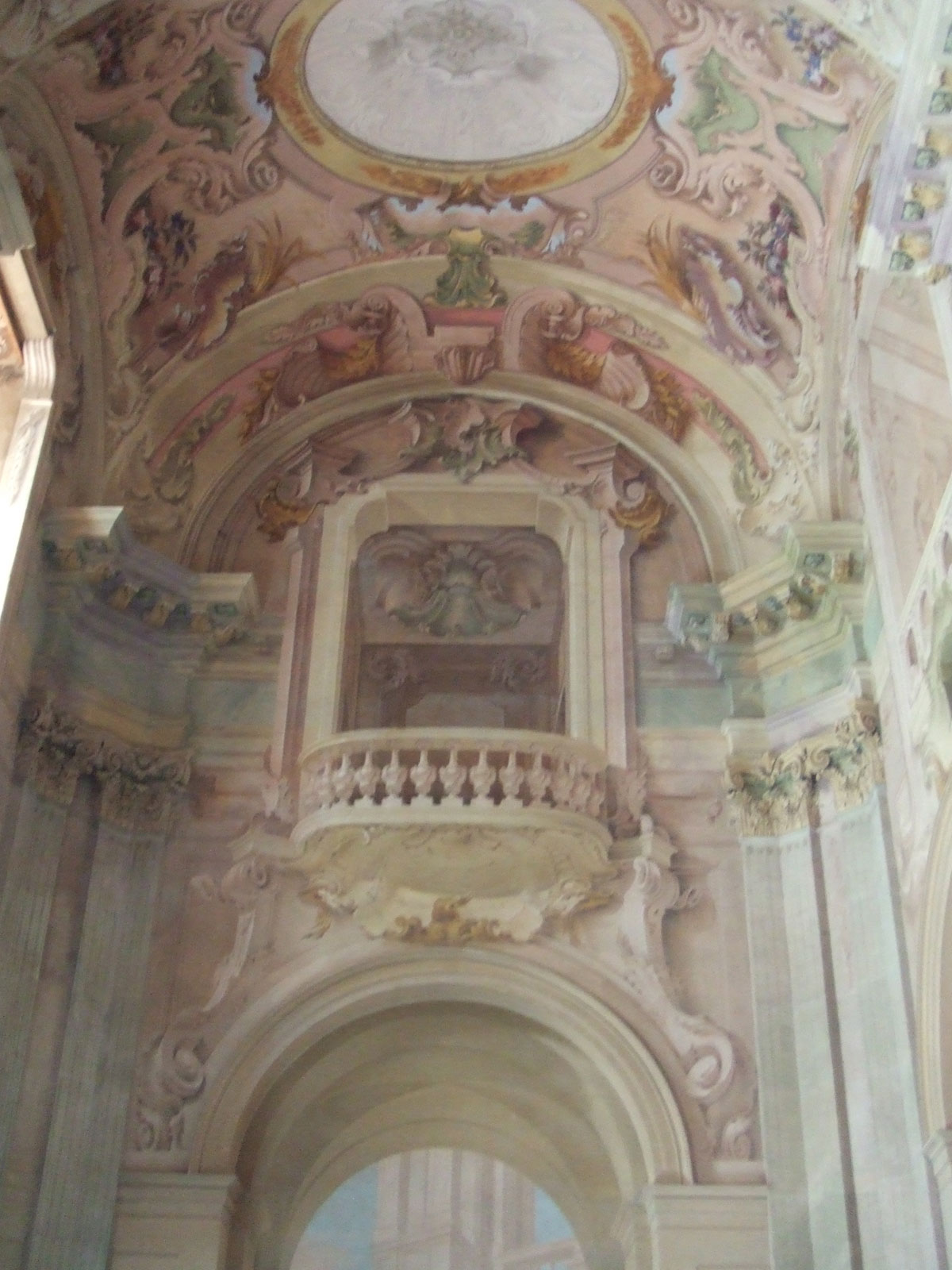 Quadratura - Santuario di Vicoforte (Italie)